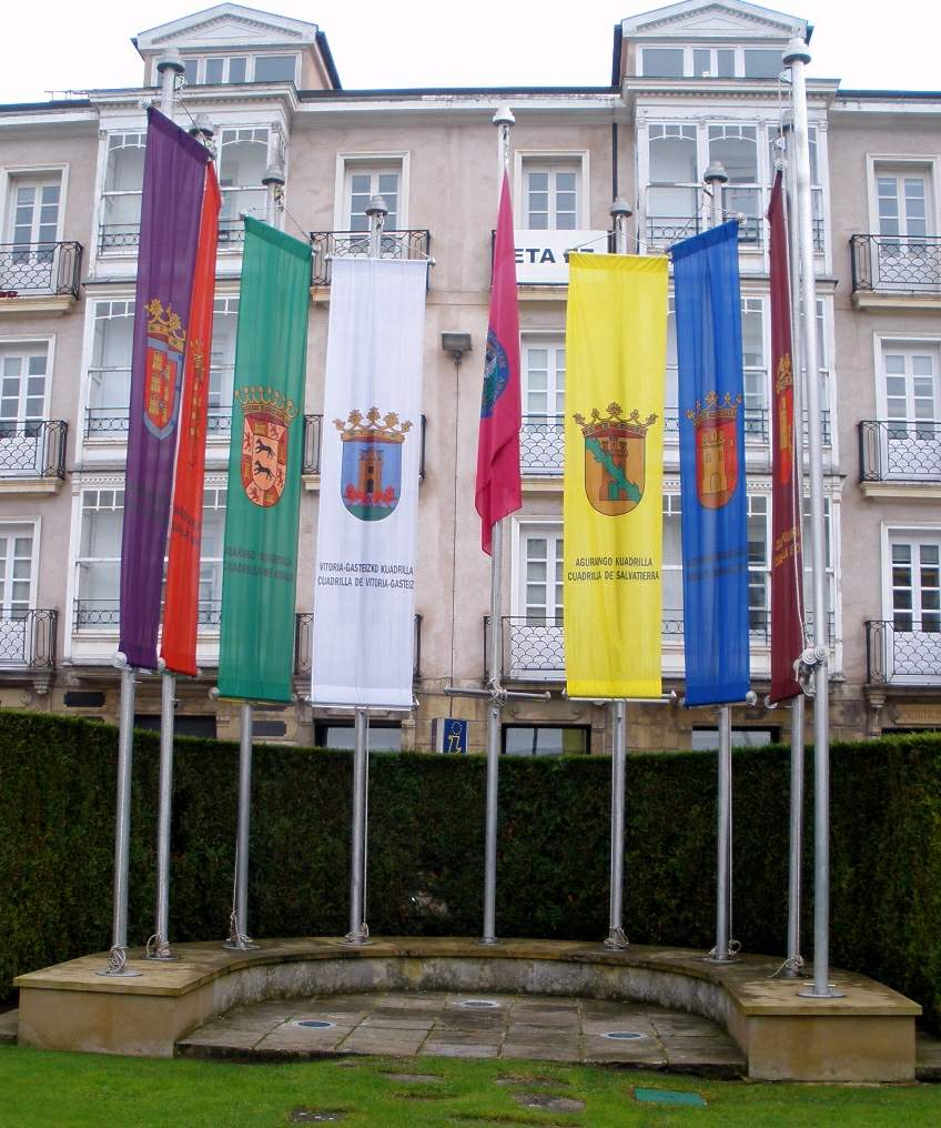 Diputación Foral de Álava, en Vitoria-Gasteiz